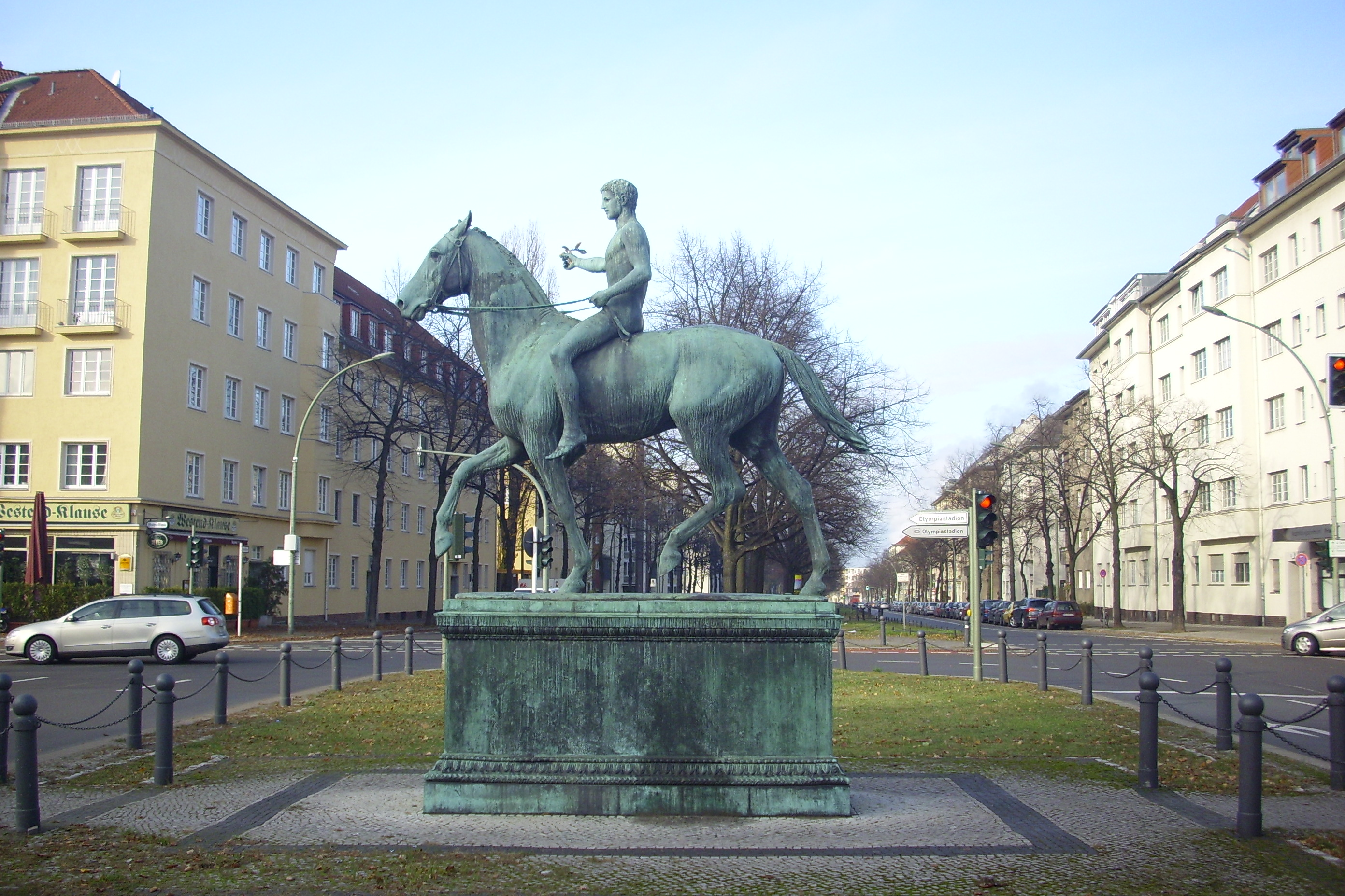 Der Steubenplatz in Berlin-Westend. Das Denkmal wurde von 1896-1902 von Louis Tuaillon erstellt.